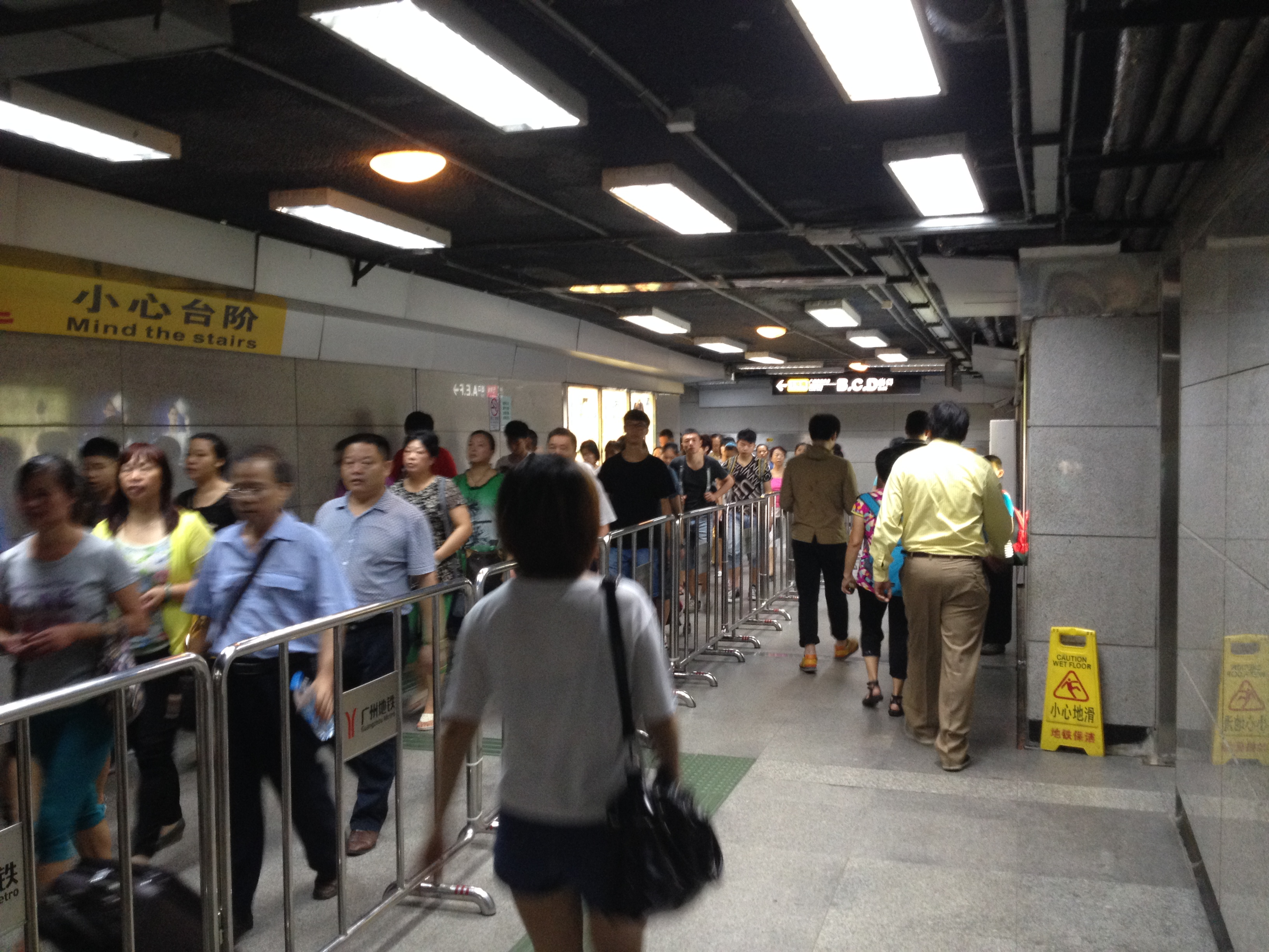 广州地铁杨箕站换乘通道